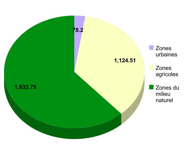 repartition des sols Grambois